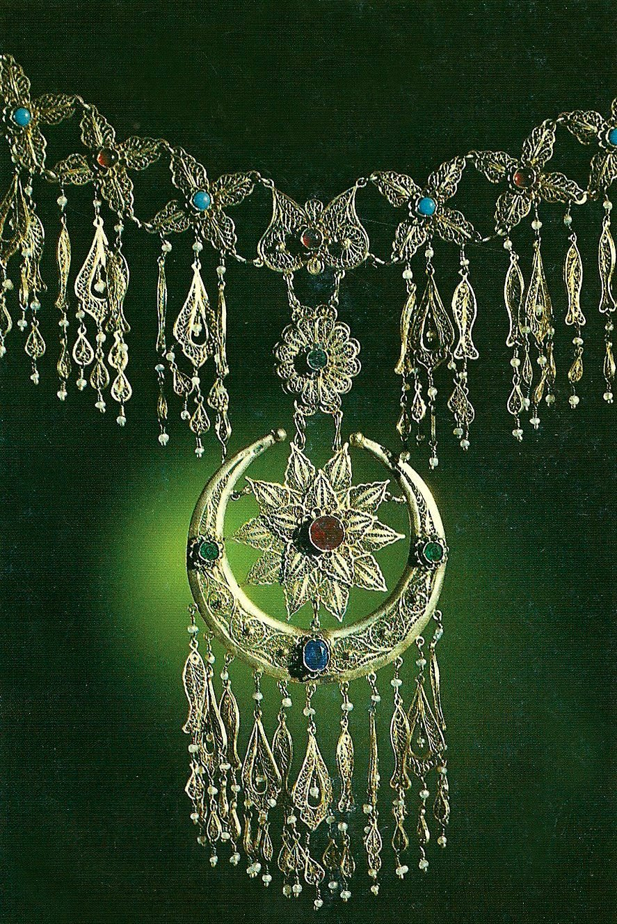 Gəncə xanlığı zərgərlik məmulatı - qızıl sinəbənd